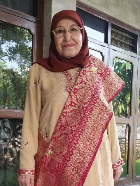 Prof. Dr. Nabila Lubis, Tokoh Wanita Agama Akademia Indonesia